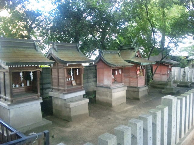 石園座多久虫玉神社。